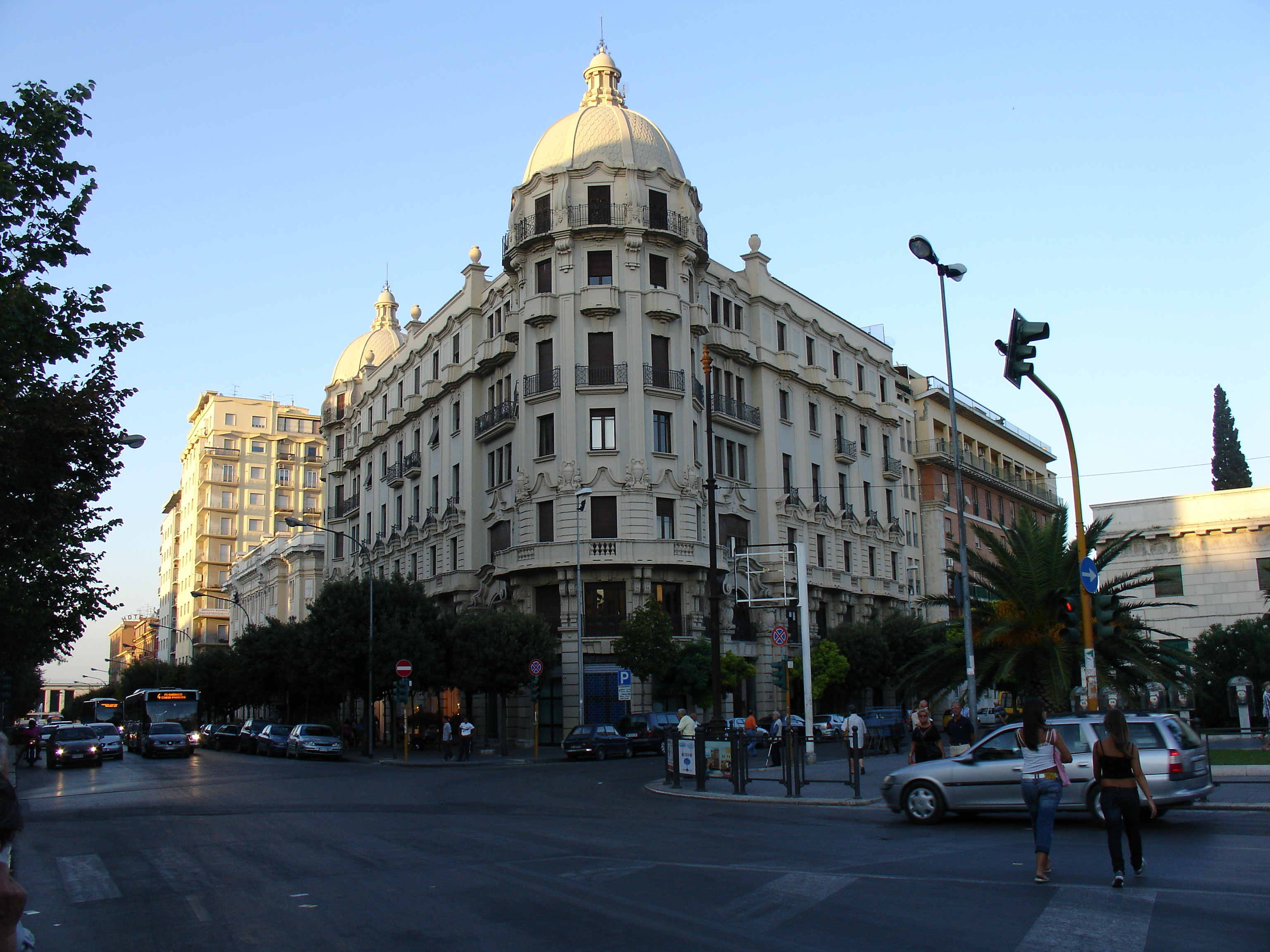 Panorama di Piazza Cavour